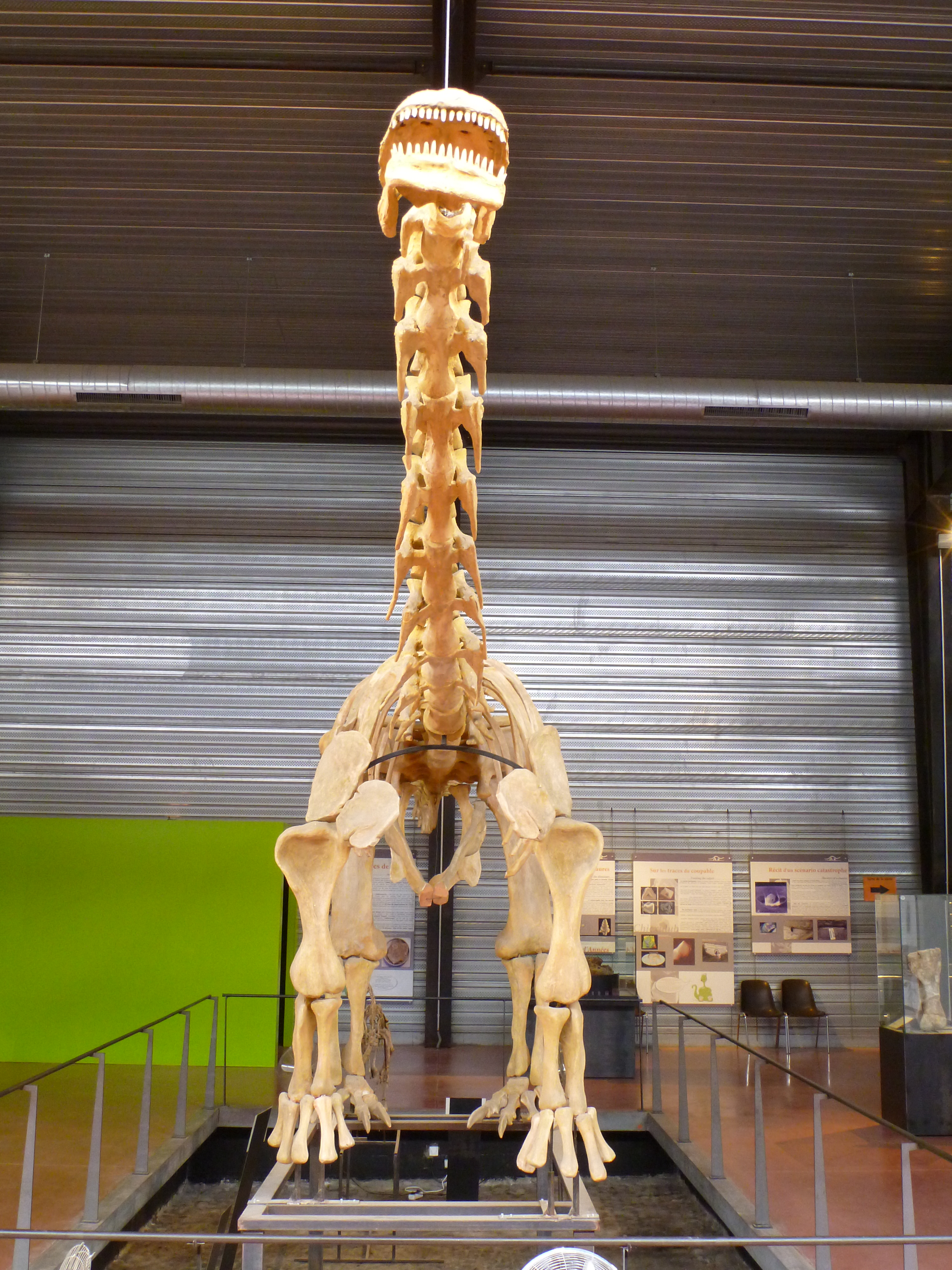 Mounted skeleton of Ampelosaurus, Musée des dinosaures, Esperaza, France